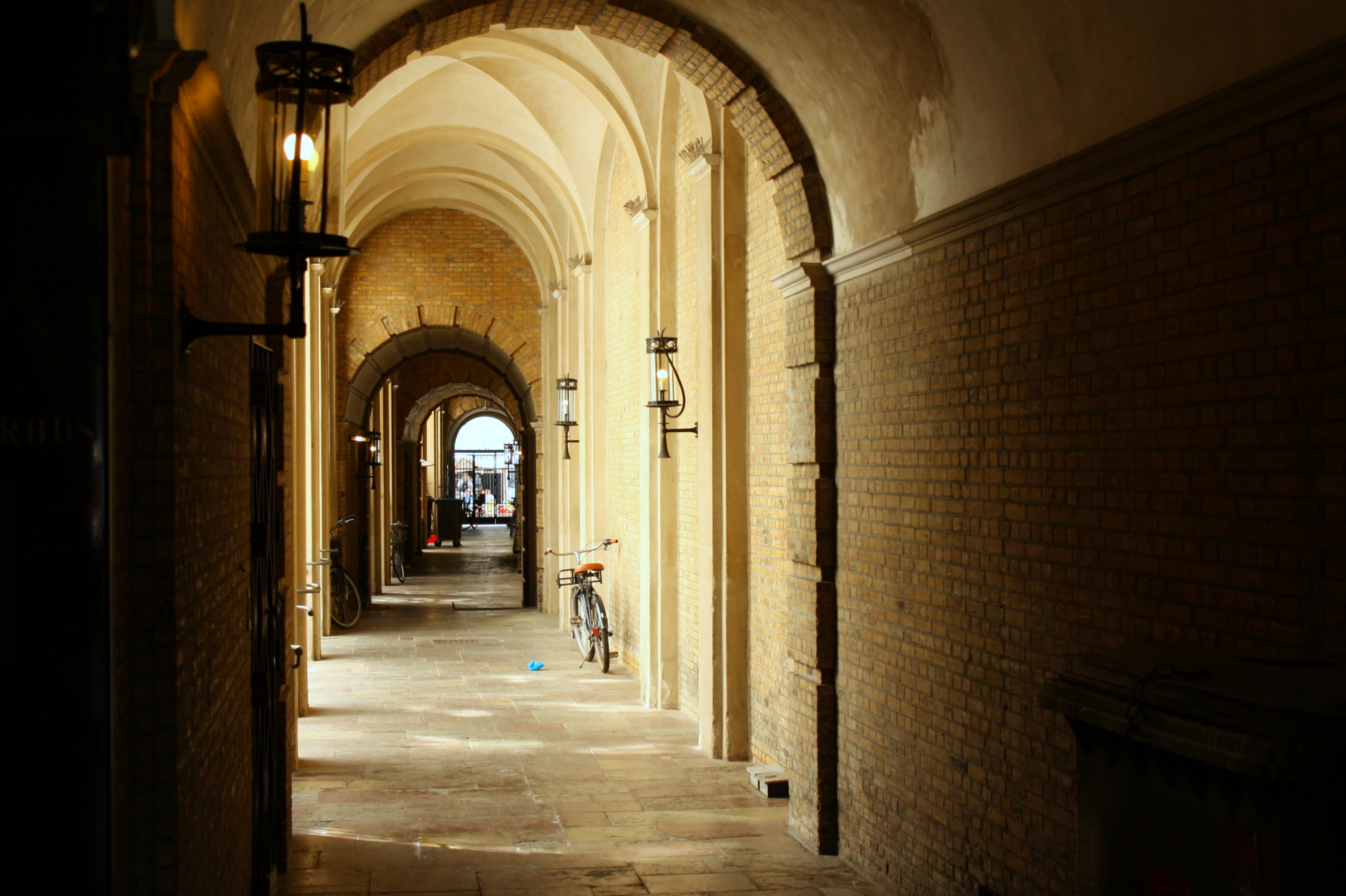 Klostergården's passageway (Klostergangen) which connects Amagertorv with Læderstræde in Copenhagen, Denmark